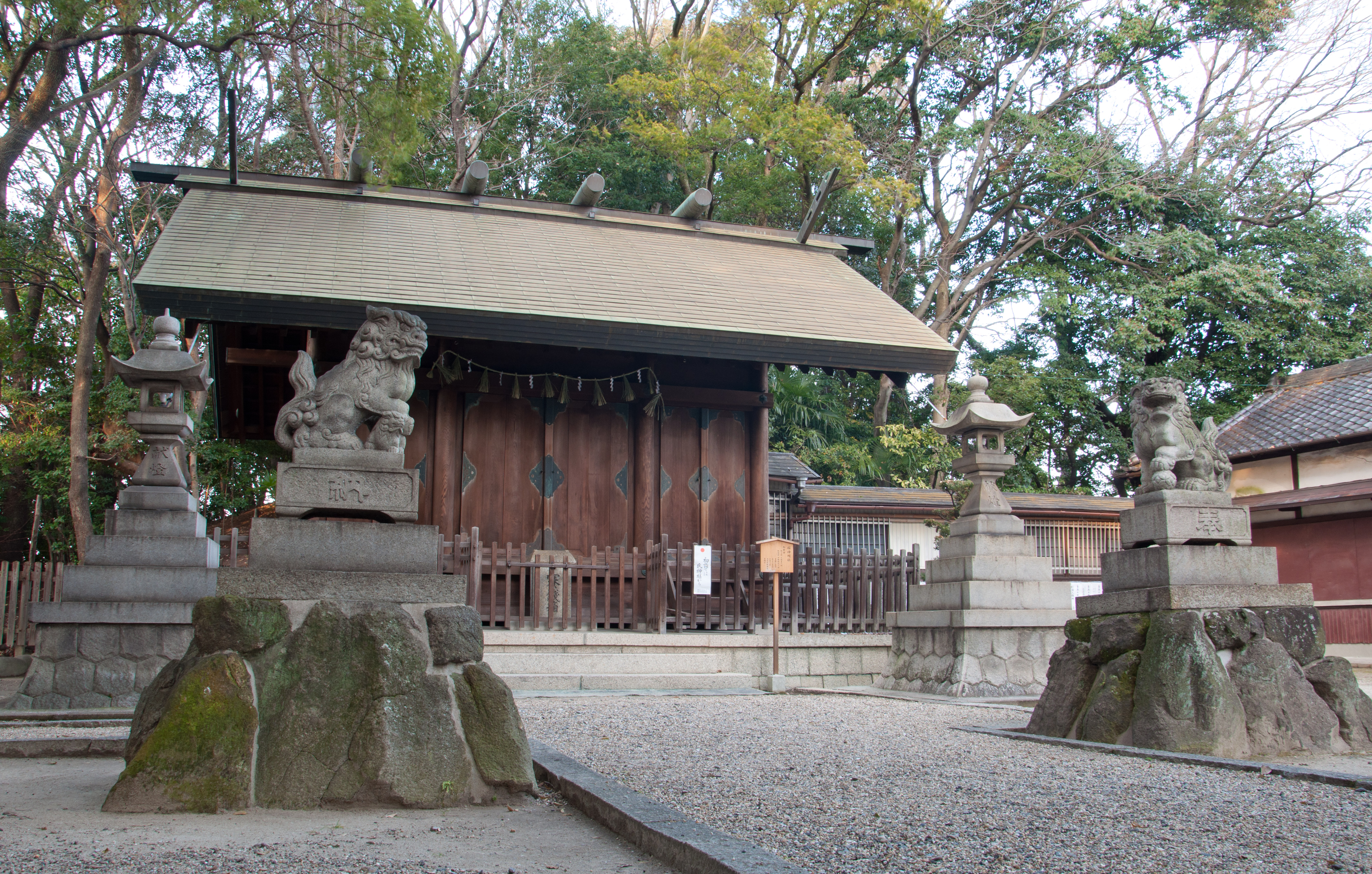 愛知県名古屋市南区呼続にある桜神明神社の拝殿